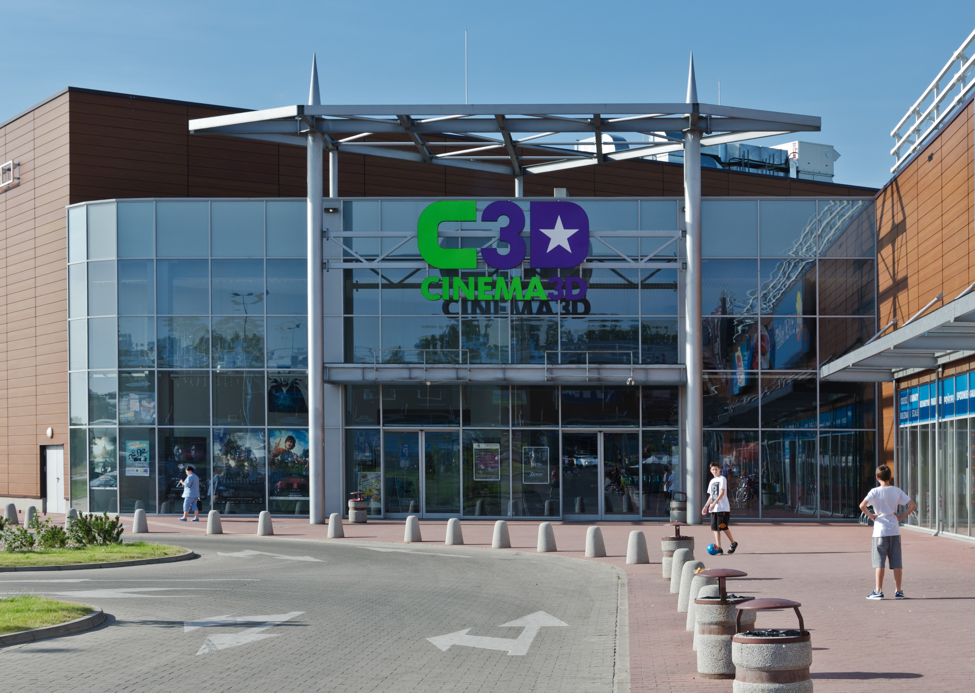 Galeria handlowa Twierdza Kłodzko